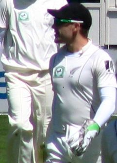 ബ്രണ്ടൻ മക്കല്ലം